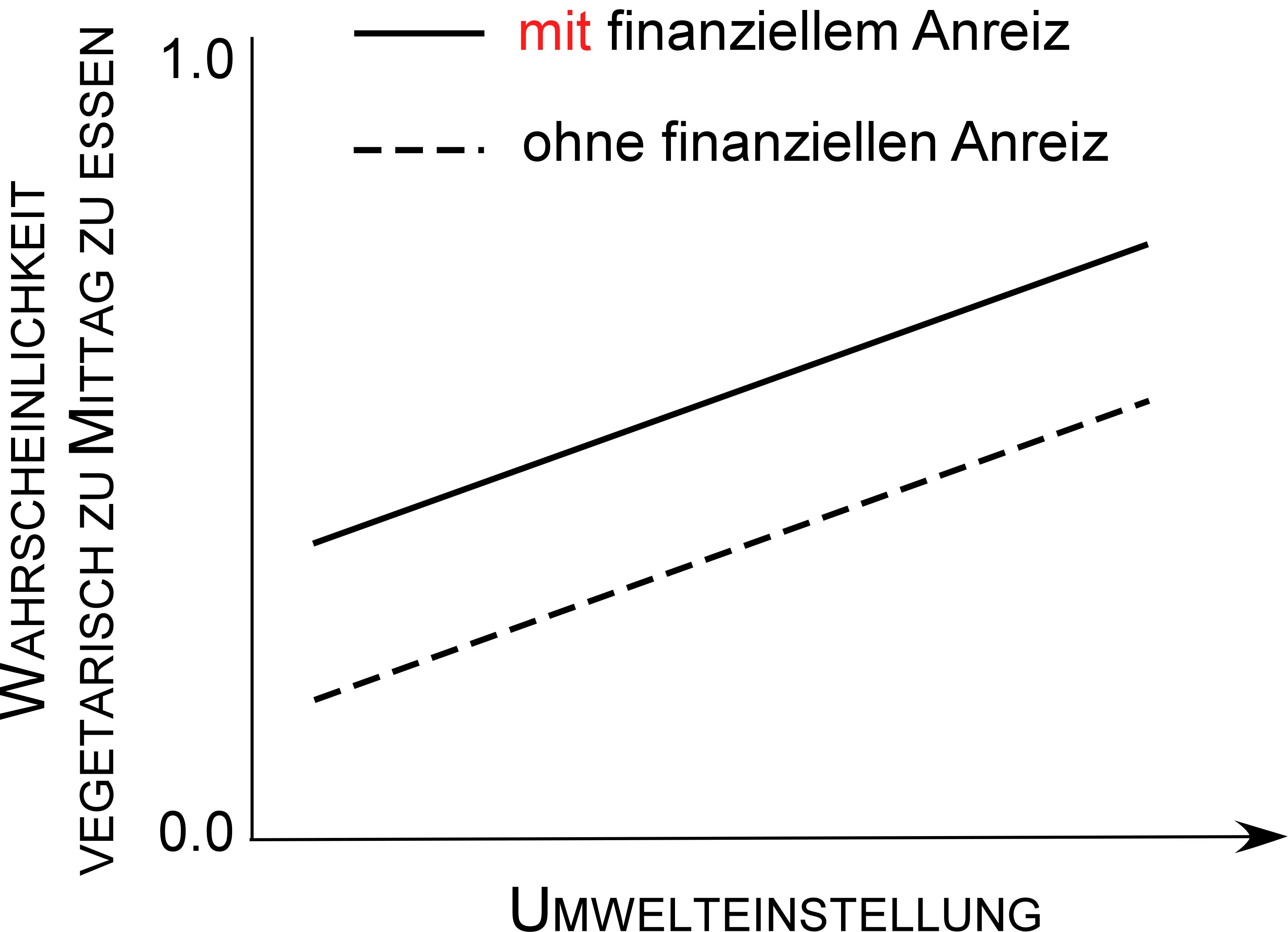 grafische Darstellung eines kompensatorischen Zusammenhangs